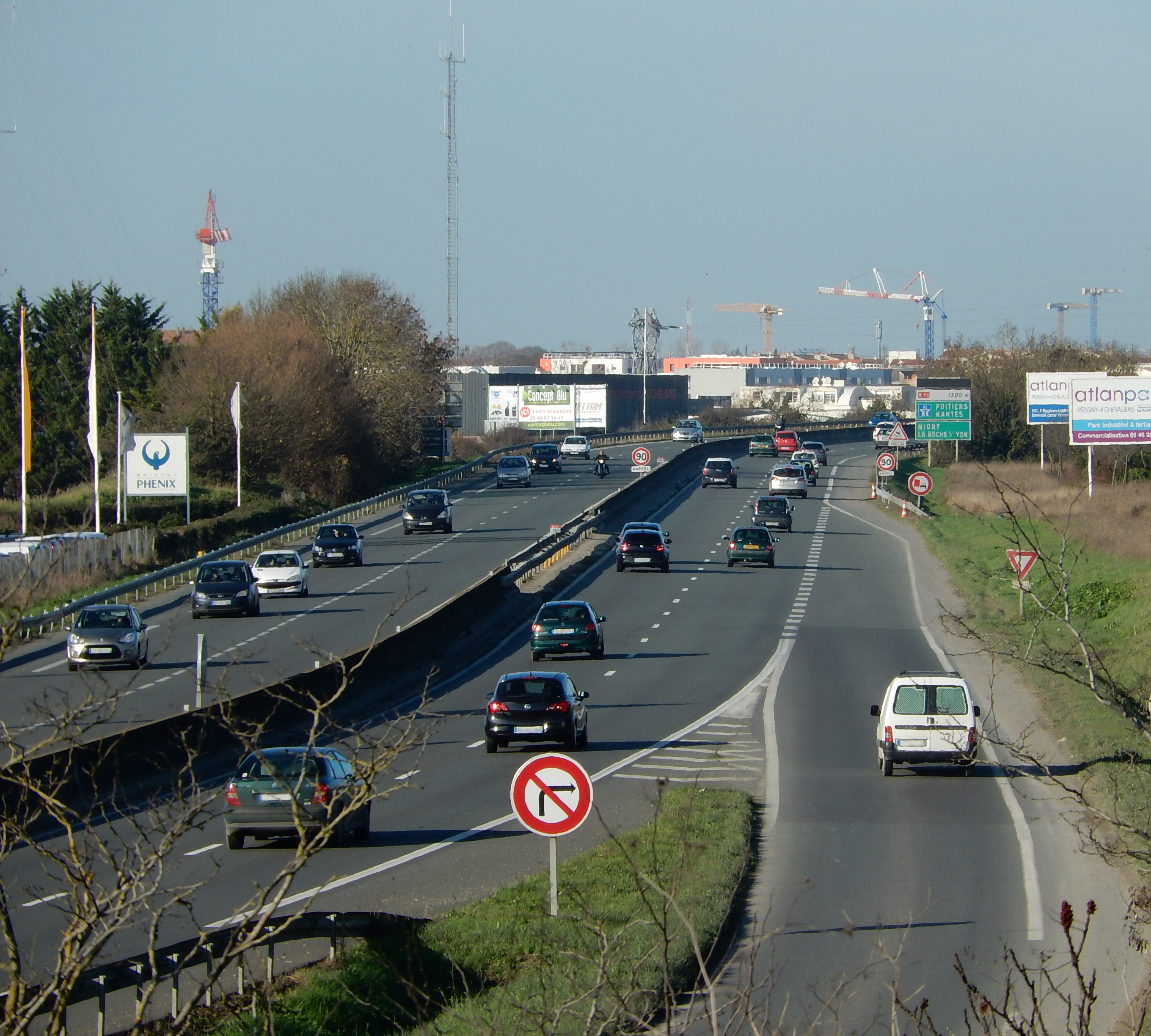 La route nationale 137 en tant que maillon Sud du contournement de La Rochelle.